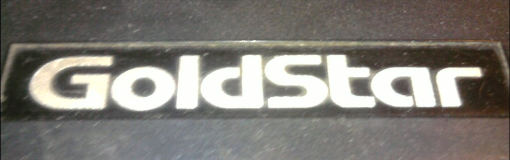 Logo de Goldstar